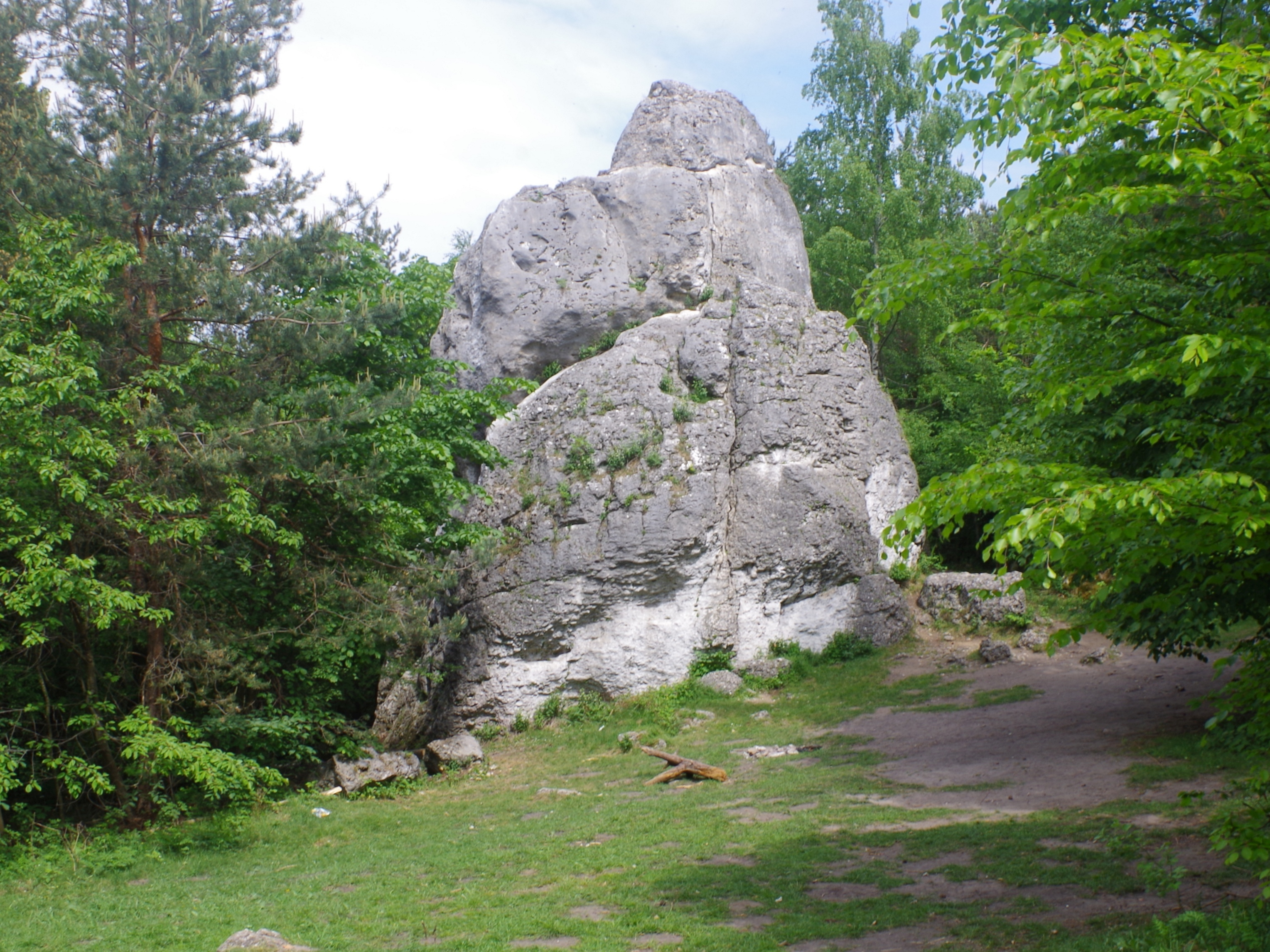 Skała Blocheńska na Górze Zborów w Podlesicach